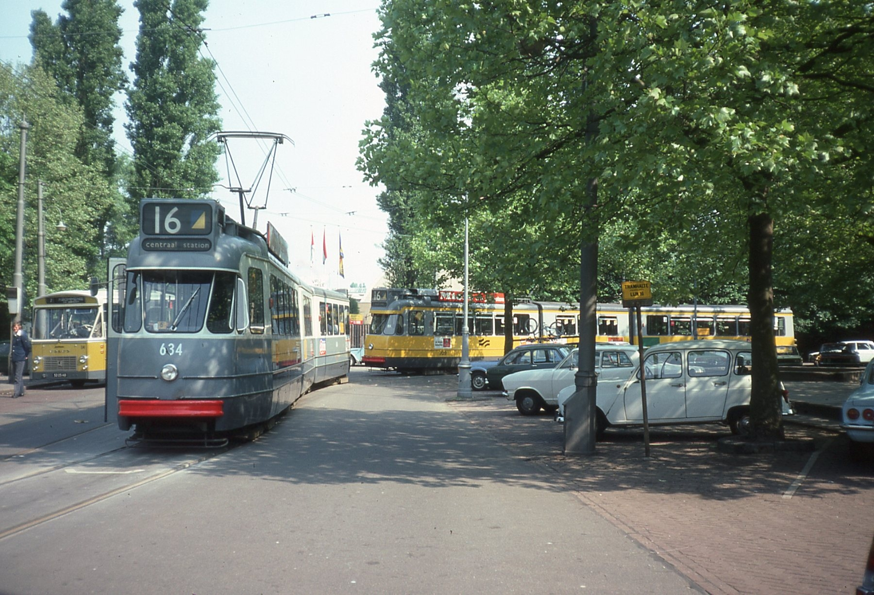 Photo. Trams aux Fils. Prise en juin 1976 Ligne 16 à Stadionstraat, Tram 634